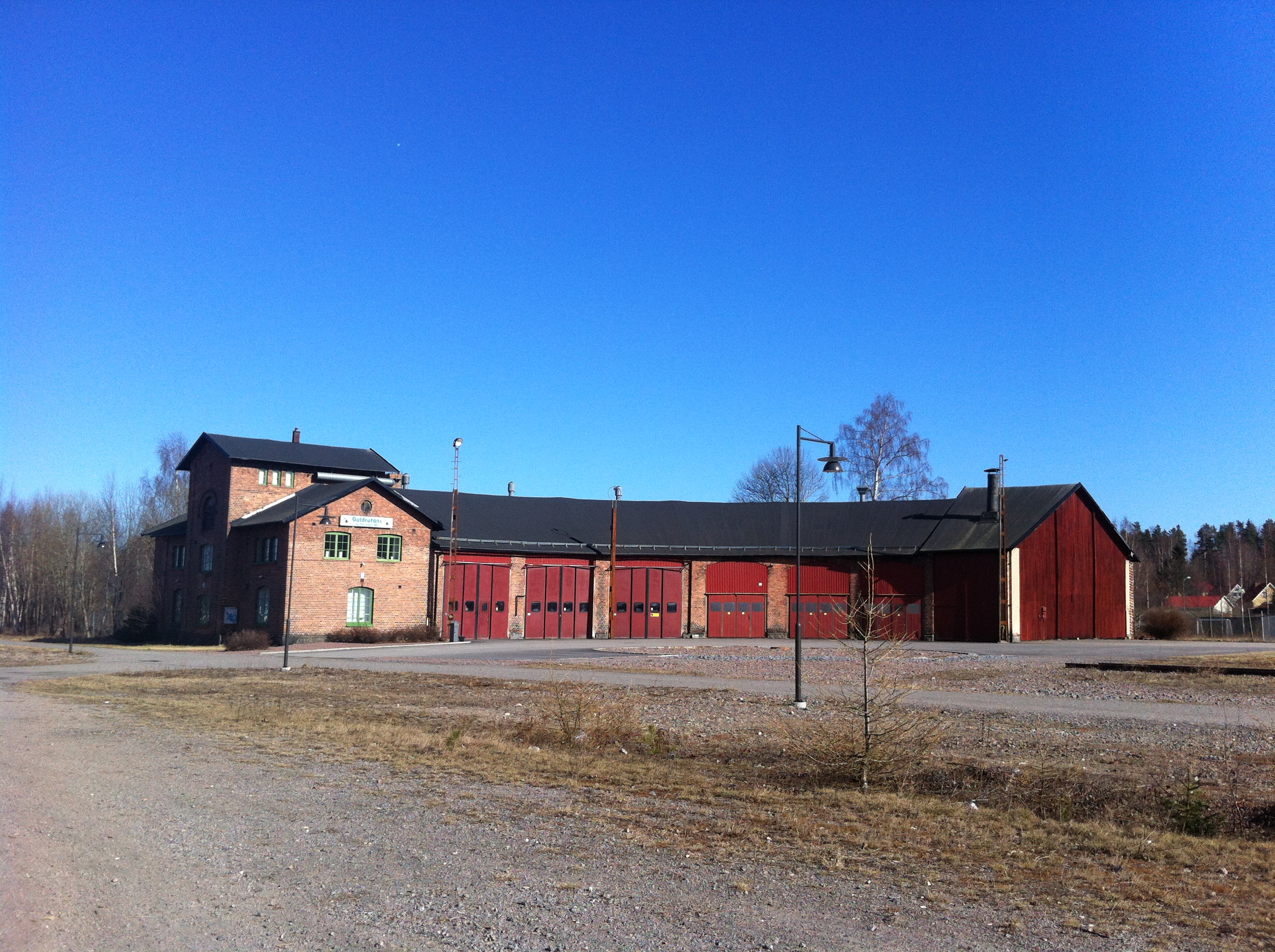 Lokverkstad i Söderhamn, belägen längs Faxholmsgatan.